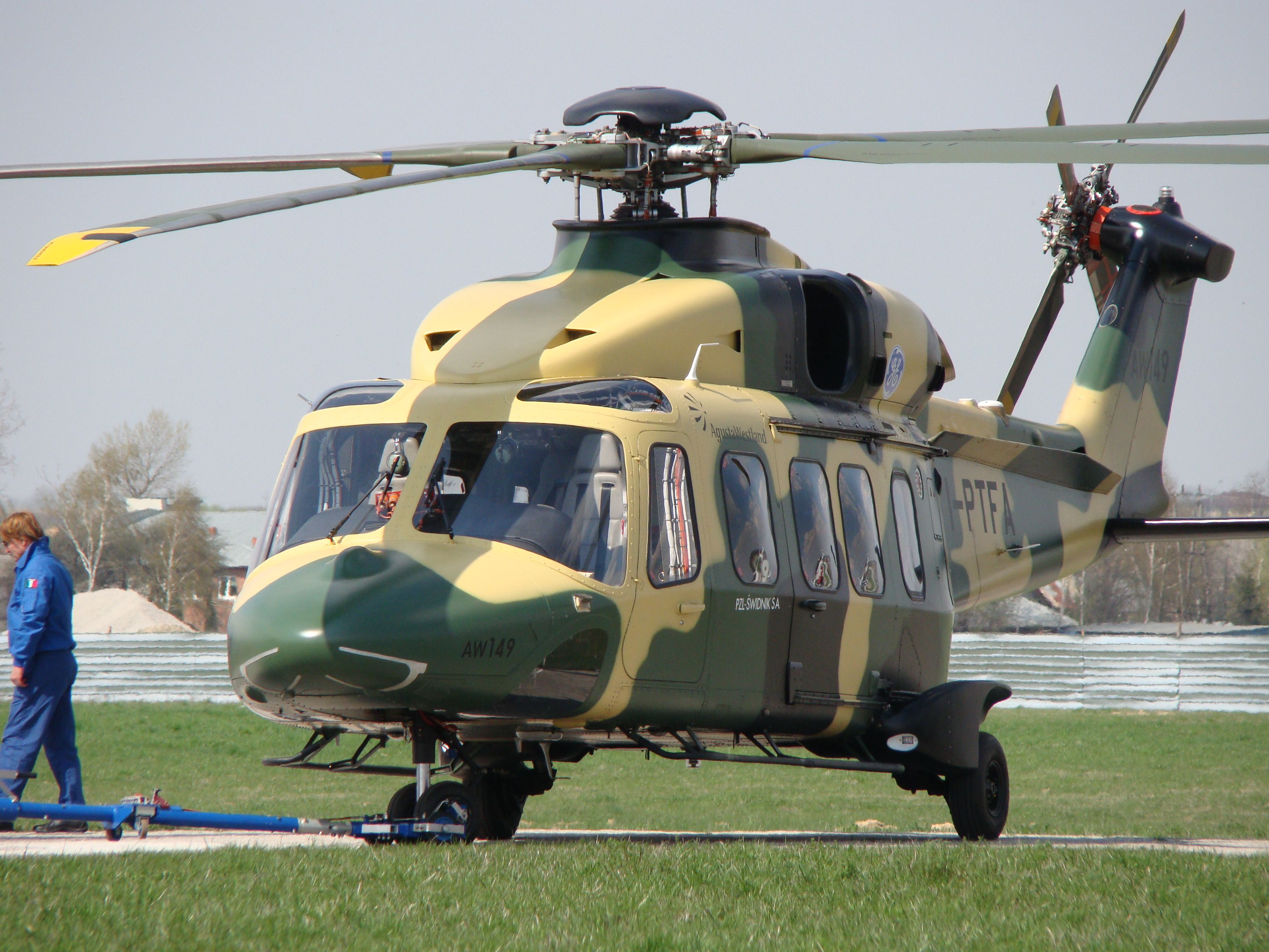 Śmigłowiec AW149 na prezentacji w PZL Świdnik dn. 22.04.2012